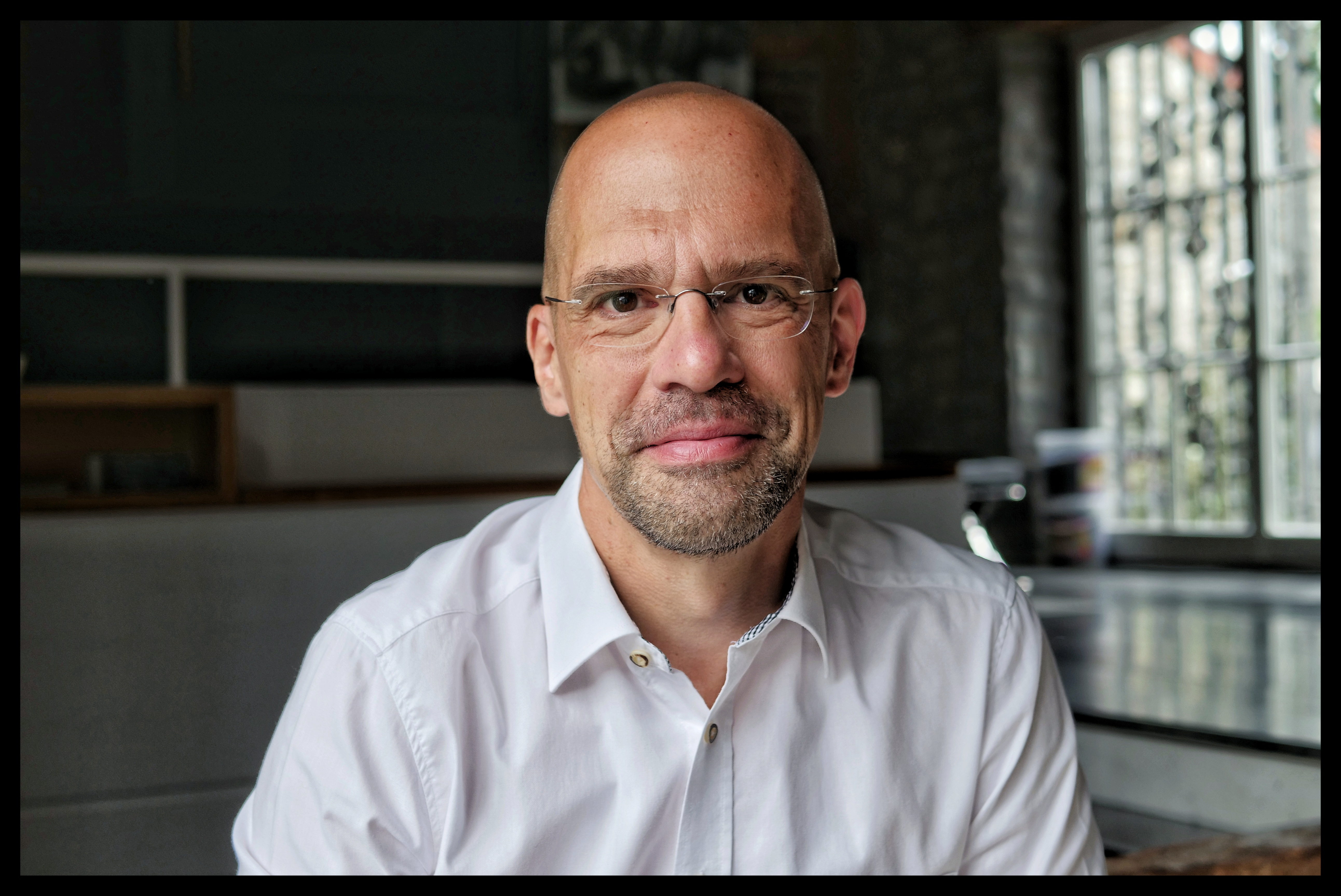 Dirk Gratzel in seinem ökologisch nachhaltigen Haus.